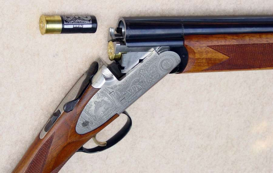 Schlosskasten / Auswerfer der BDF